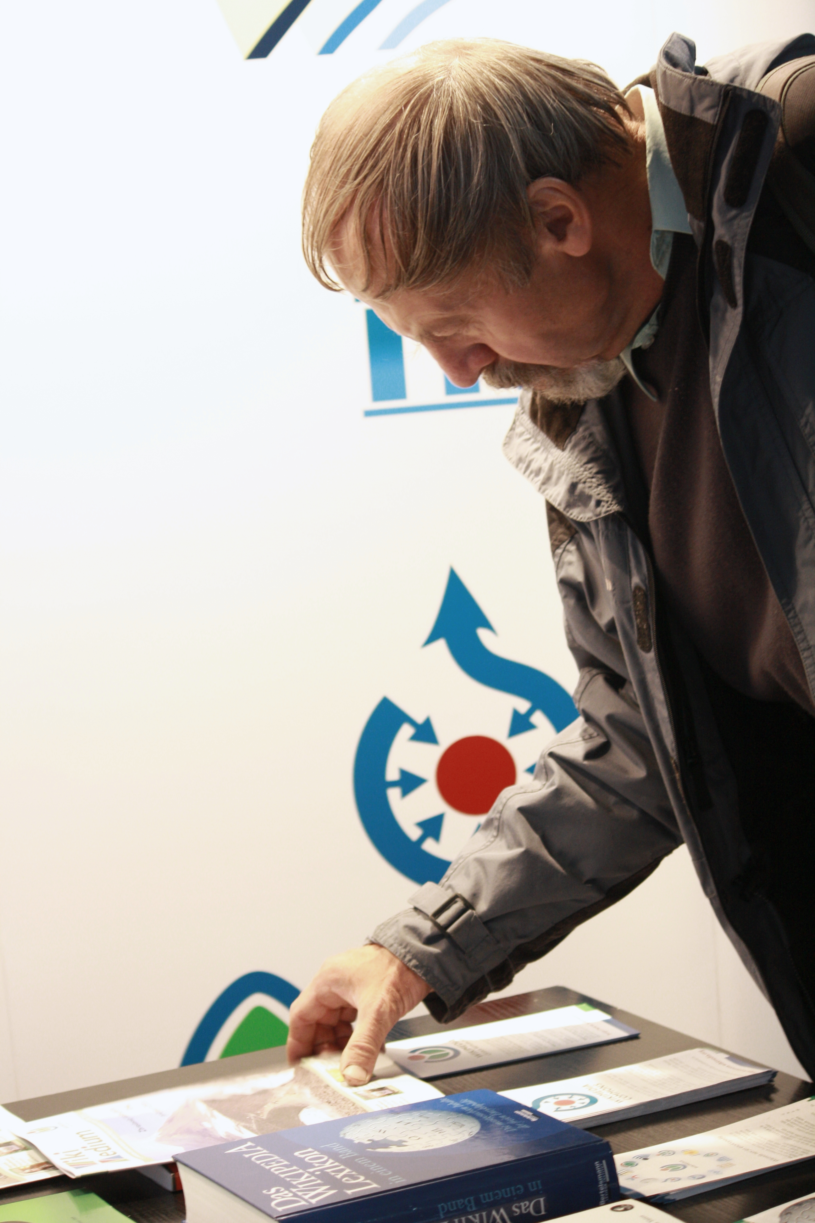 Svět knihy 2010 - Wikimedia ČR This photograph was taken with a DSLR from WMCZ's Camera grant.